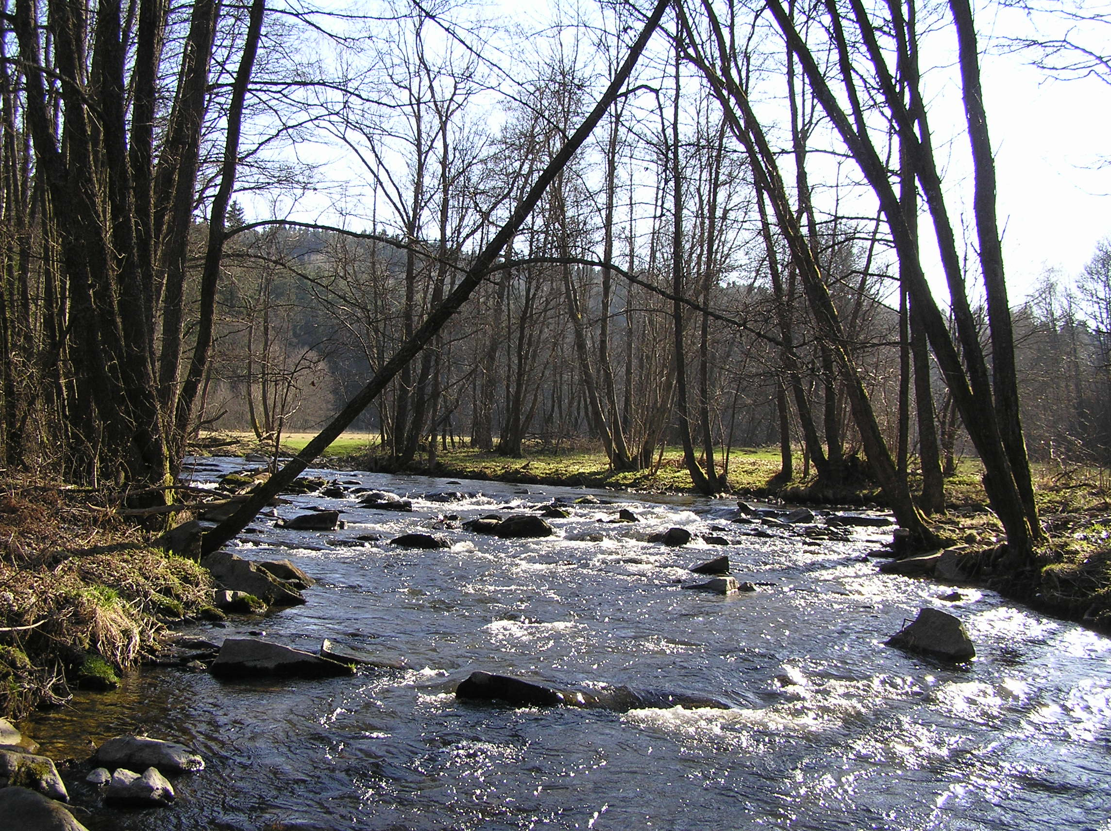 Řeka Spůlka u Spůle